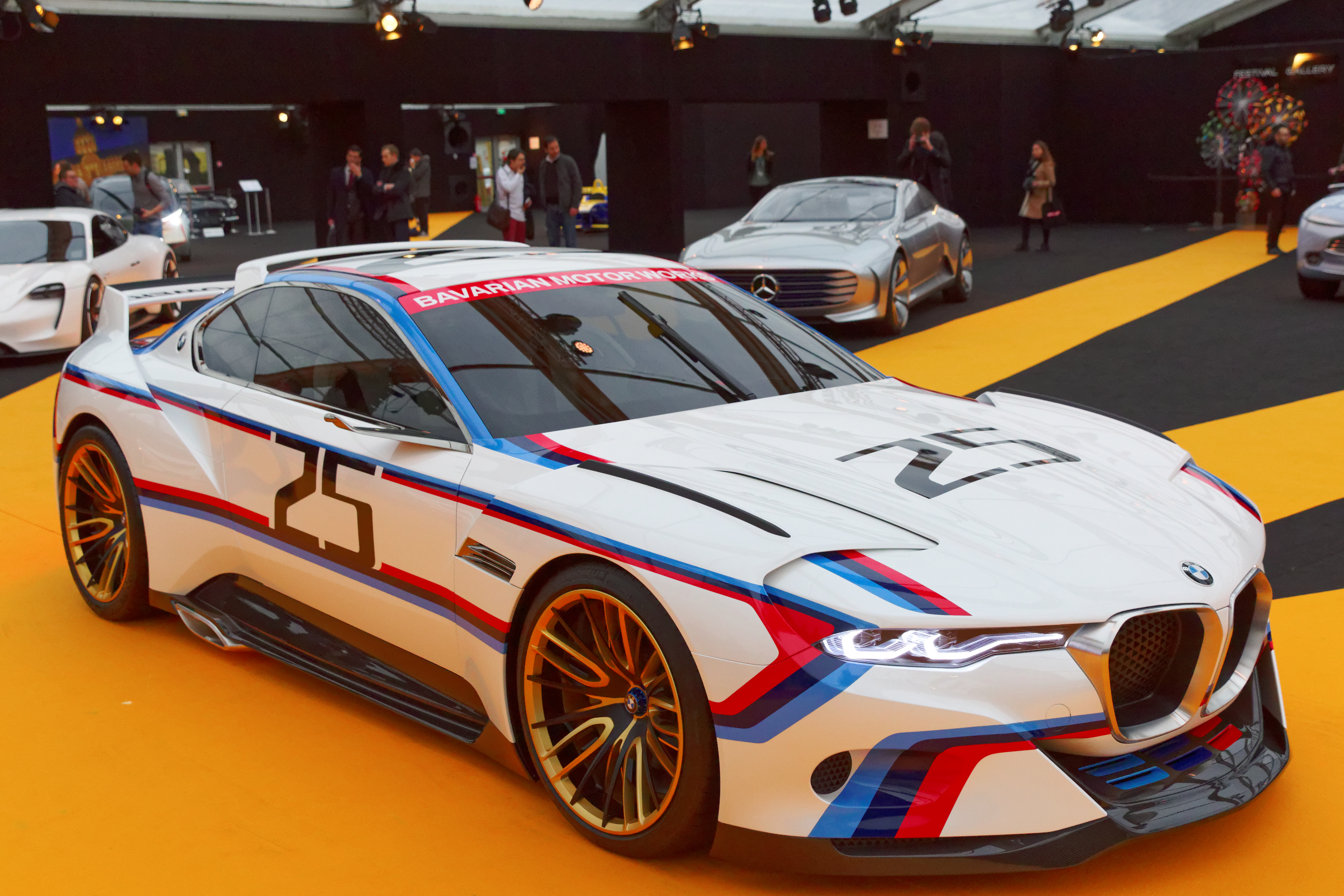 La BMW 3.0 CSL Hommage exposée lors du festival automobile international 2016.